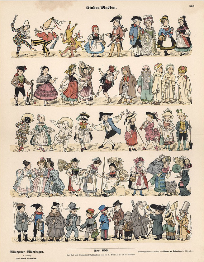 Münchener Bilderbogen, Nr. 806 "Kinder-Masken", Verlag Braun & Schneider München 1878